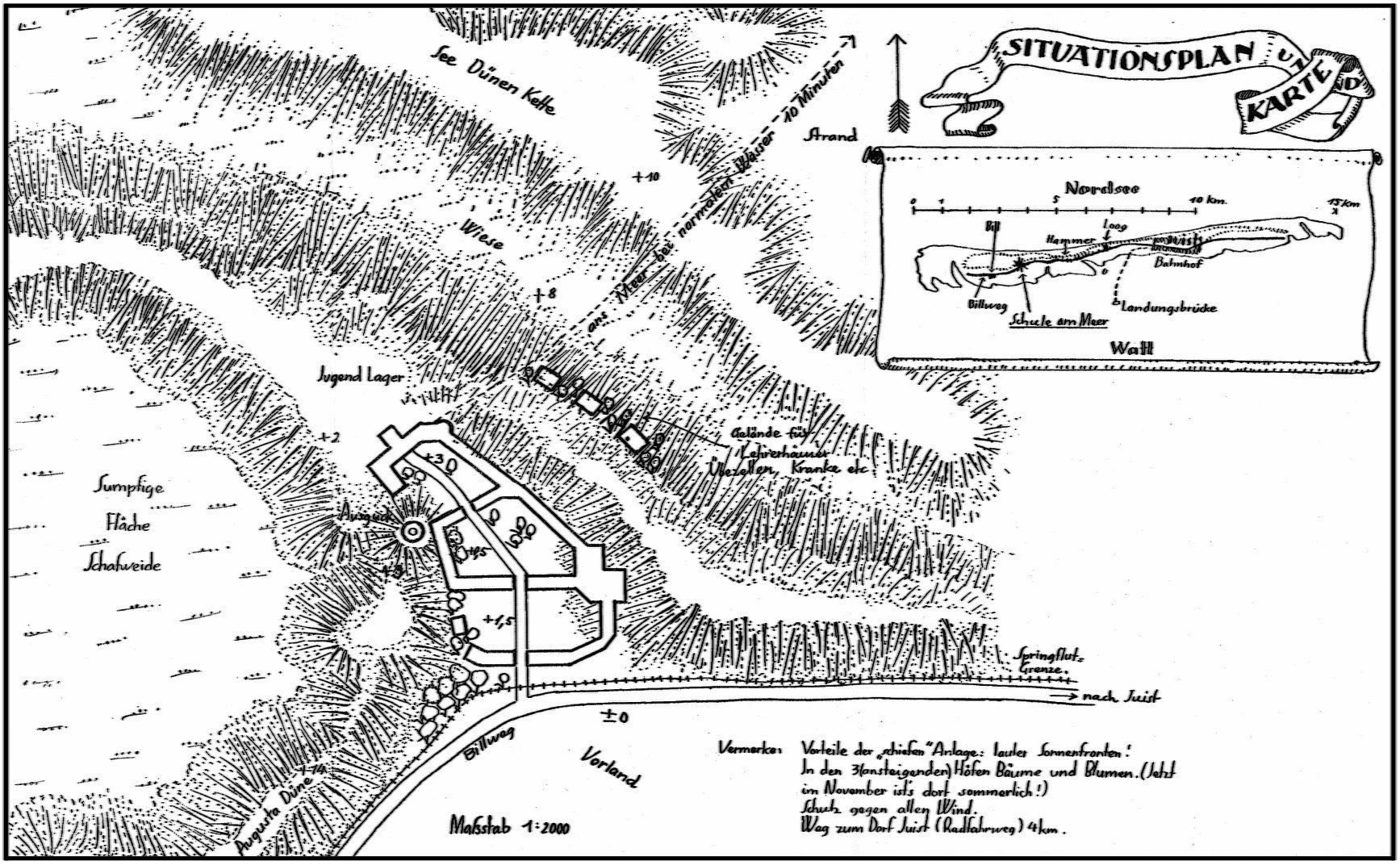 Zeichnung des Entwurfs eines Situationsplans für die geplante Schule am Meer auf der Nordseeinsel Juist (Ostfriesland) aus dem Jahr 1924. Die Gebäudestrukturen sind in ein Dünental eingebettet, während der als Aussichtspunkt konzipierte Pavillon mit Kuppeldach den höchsten Punkt einer angrenzenden Düne einnimmt. Etwas erhaben sind auch die außerhalb des Schulgeländes angesiedelten Lehrerhäuser und Wirtschaftshöfe vorgesehen. Von Anfang an wird auf Gartenbau und Tierzucht fokussiert, um eine teilweise Selbstversorgung zu ermöglichen.